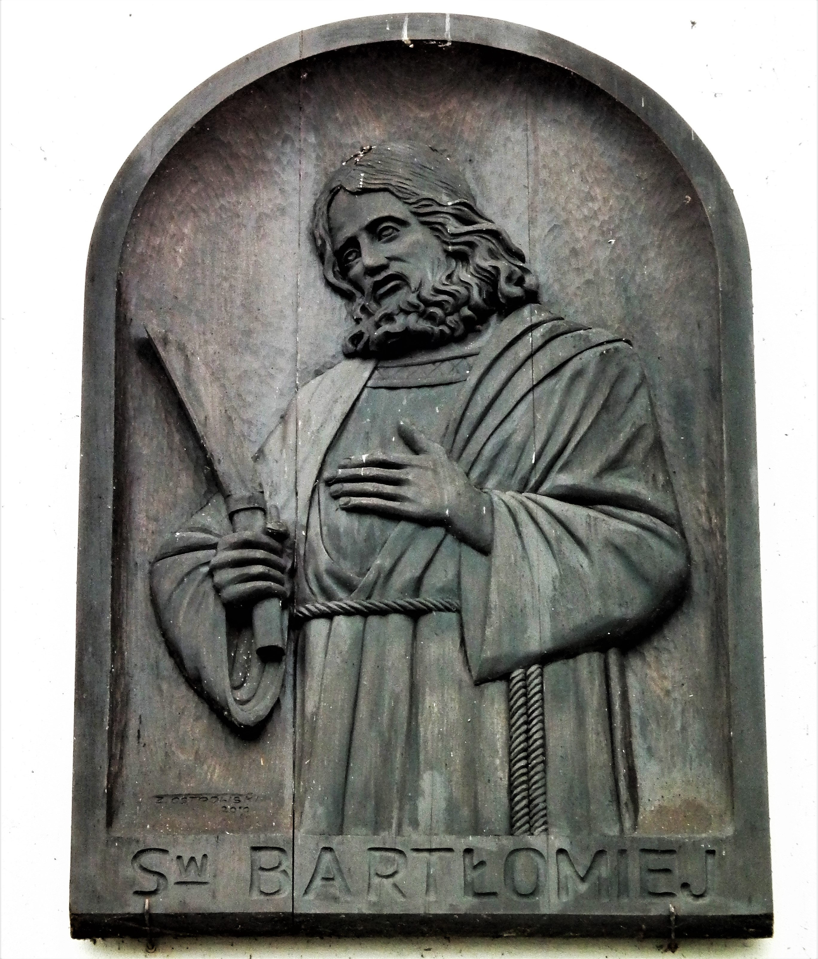 Kościół św. Bartłomieja w Smólniku. Płaskorzeźba na zewnątrz. Kościół z lat 1969-1974. Podanie twórcy nie jest możliwe uwzględniając istniejące możliwości.